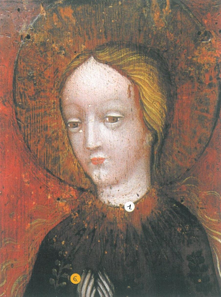 Deskový obraz Panny Marie Budějovické (neznámý autor, Itálie, počátek 15. století) v průběhu restaurování – detail